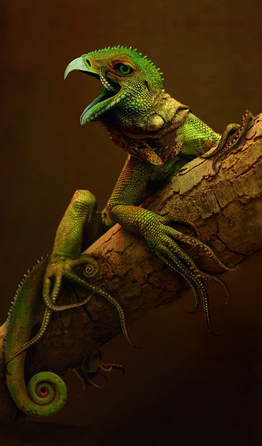 Iguana